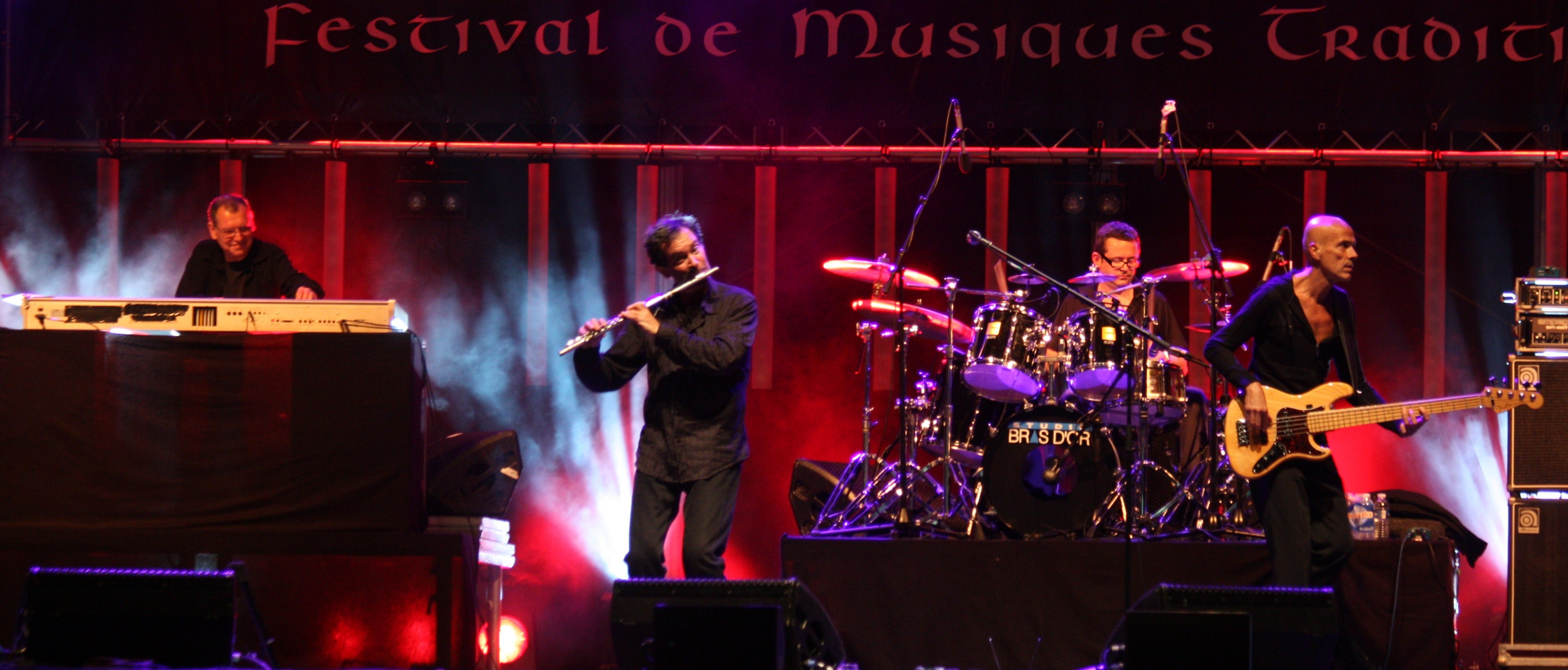 Le groupe Gwendal au festival Het Lindeboom à Loon-Plage en 2009.